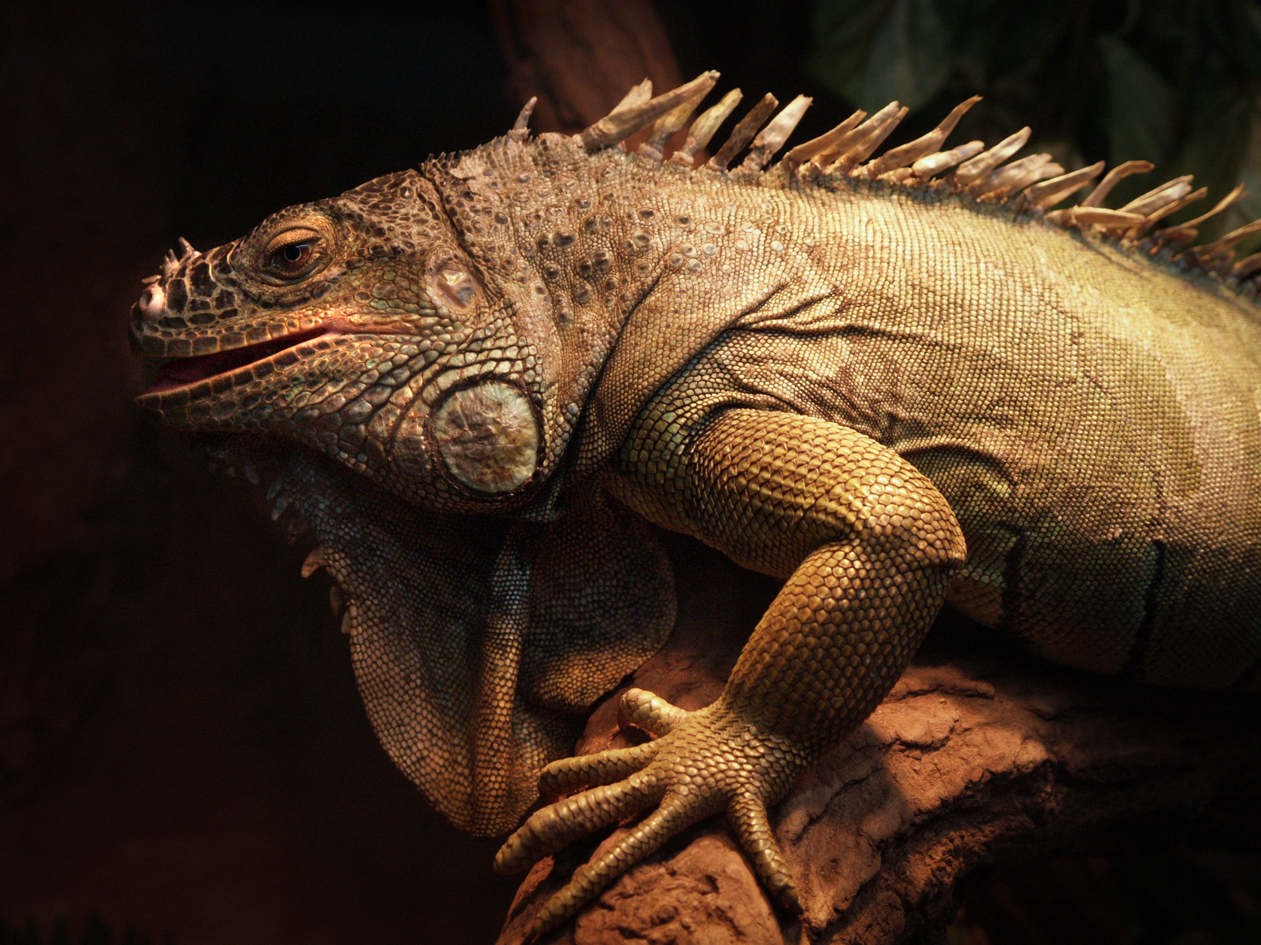 Green Iguana (Iguana iguana)